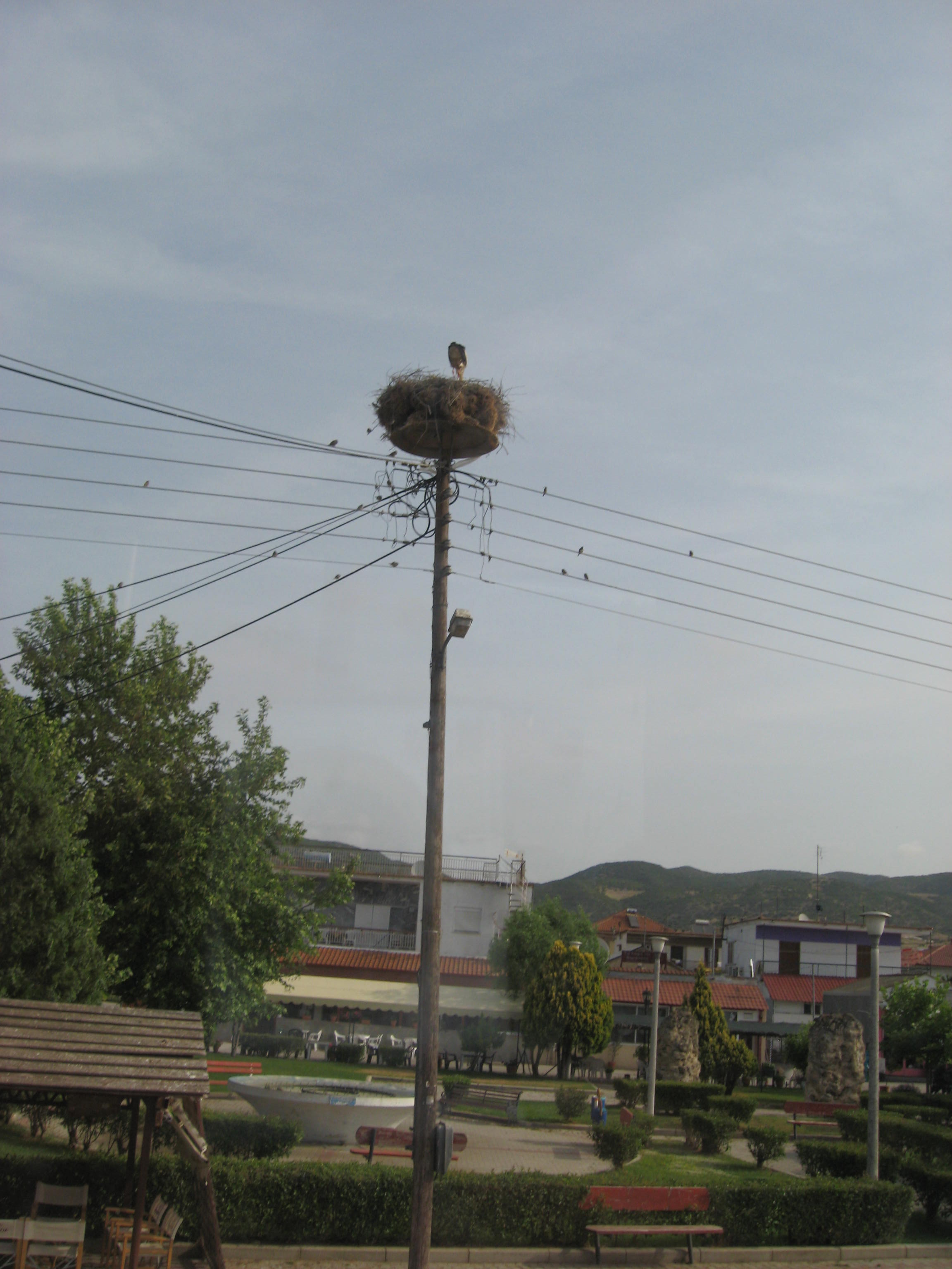 Родино гнездо на бандери у Грчкој.